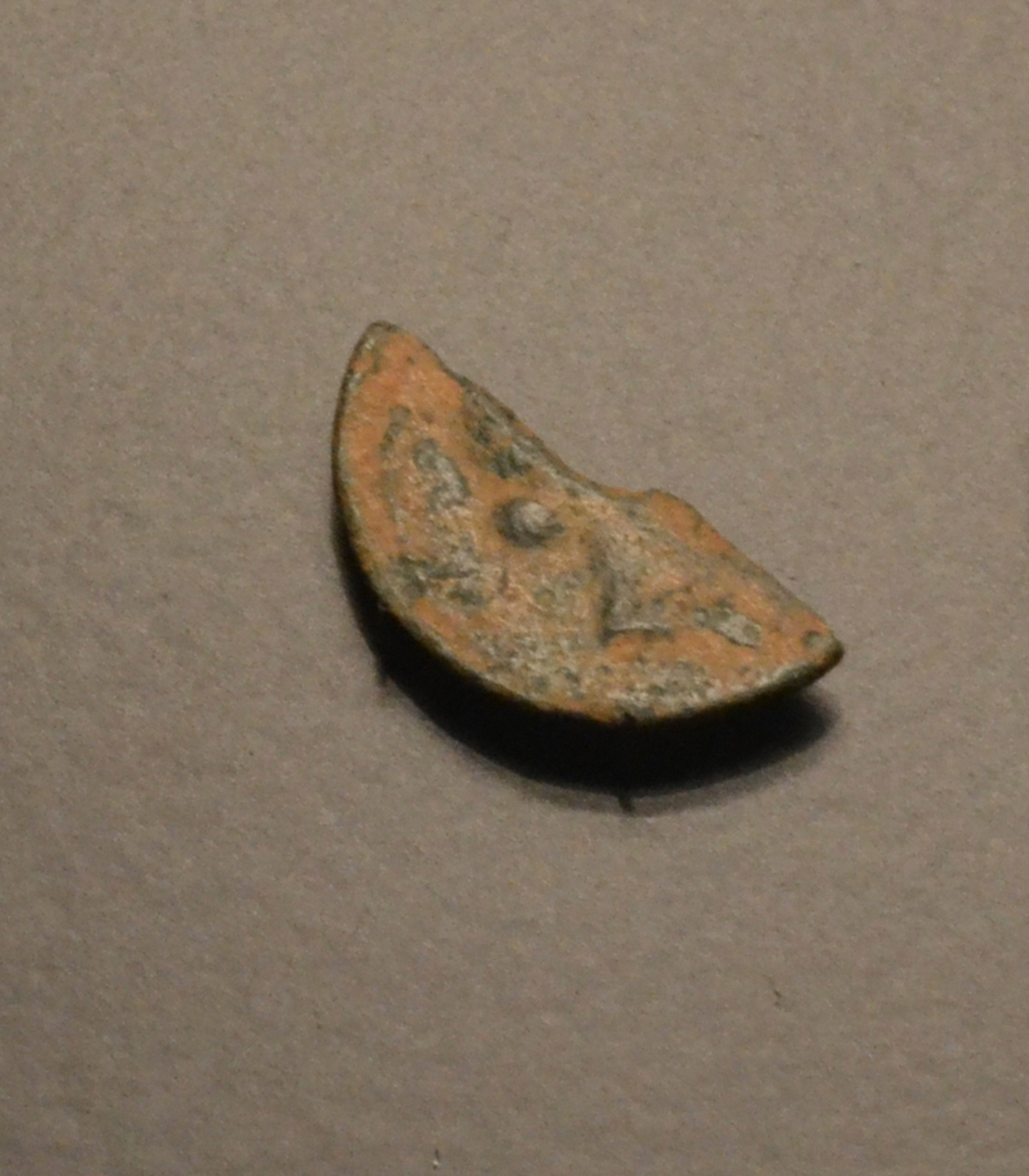 As ibérico recortado. Siglo II a. C. Museo de Prehistoria de Valencia.